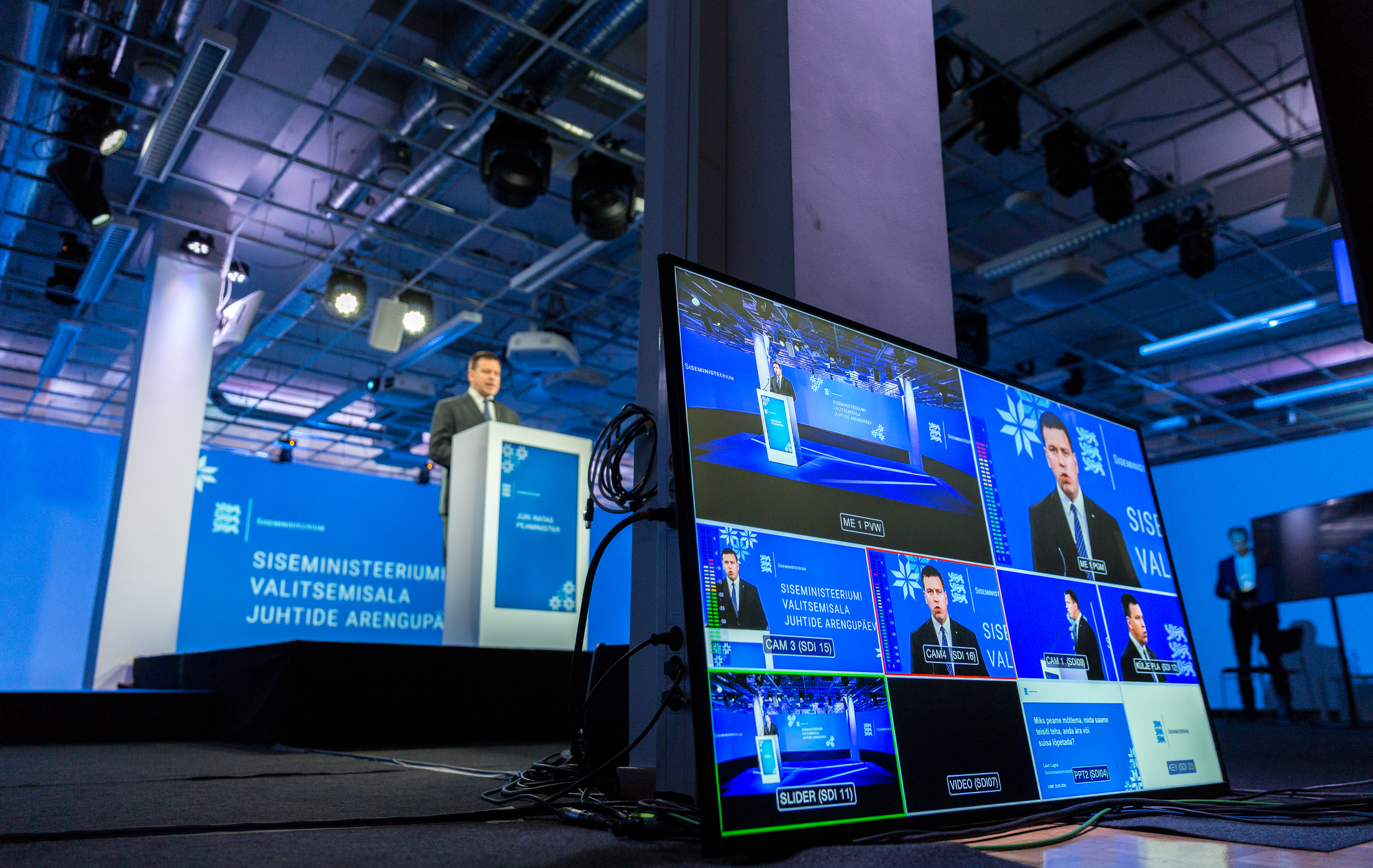 2020. aastal toimus Siseministeeriumi haldusala juhtide arengupäev virtuaalses vormis.